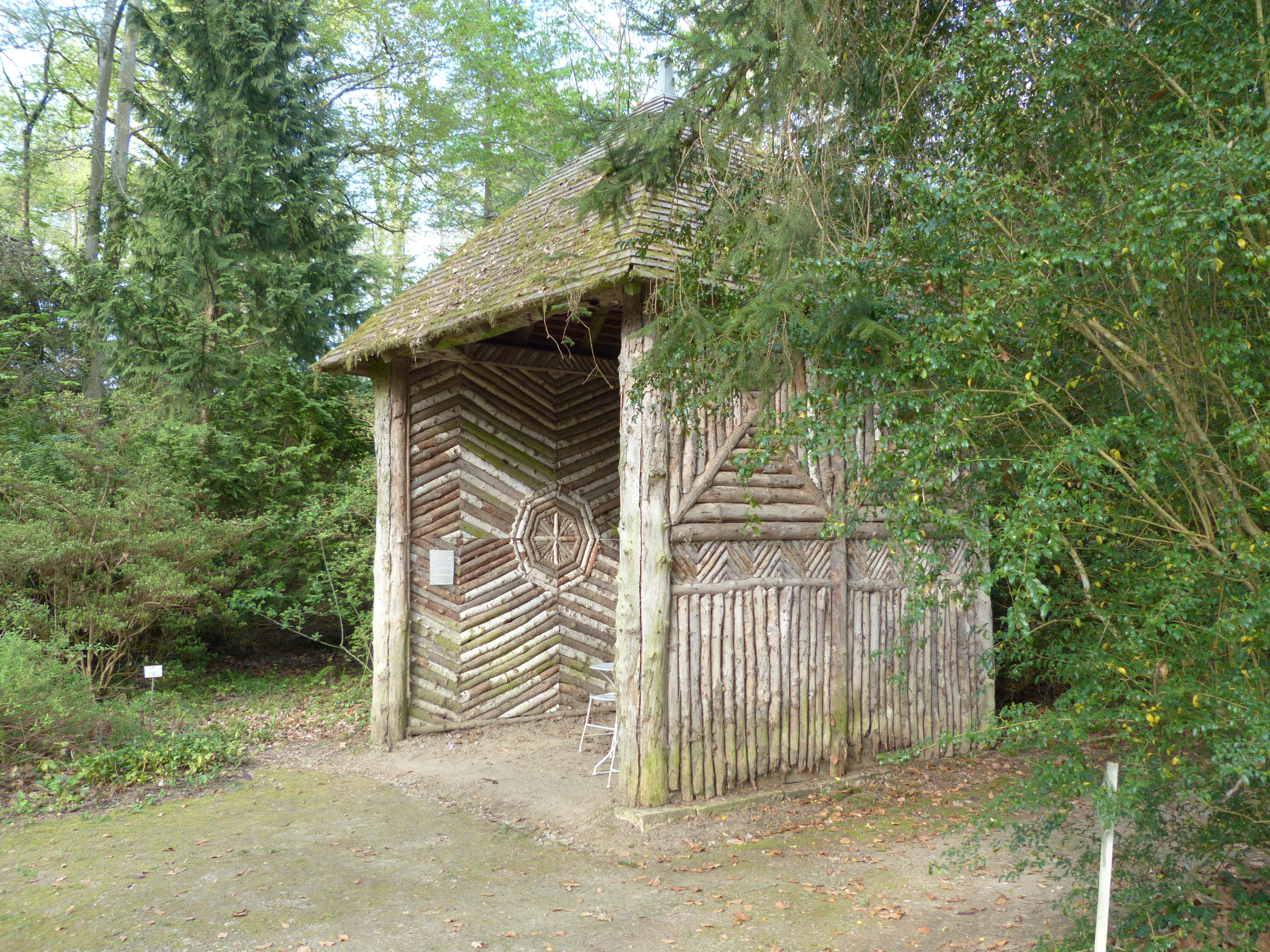 Arboretum de Balaine (Villeneuve-sur-Allier, France). Fabrique dans le parc : cabane en rondins de bouleau (1840).